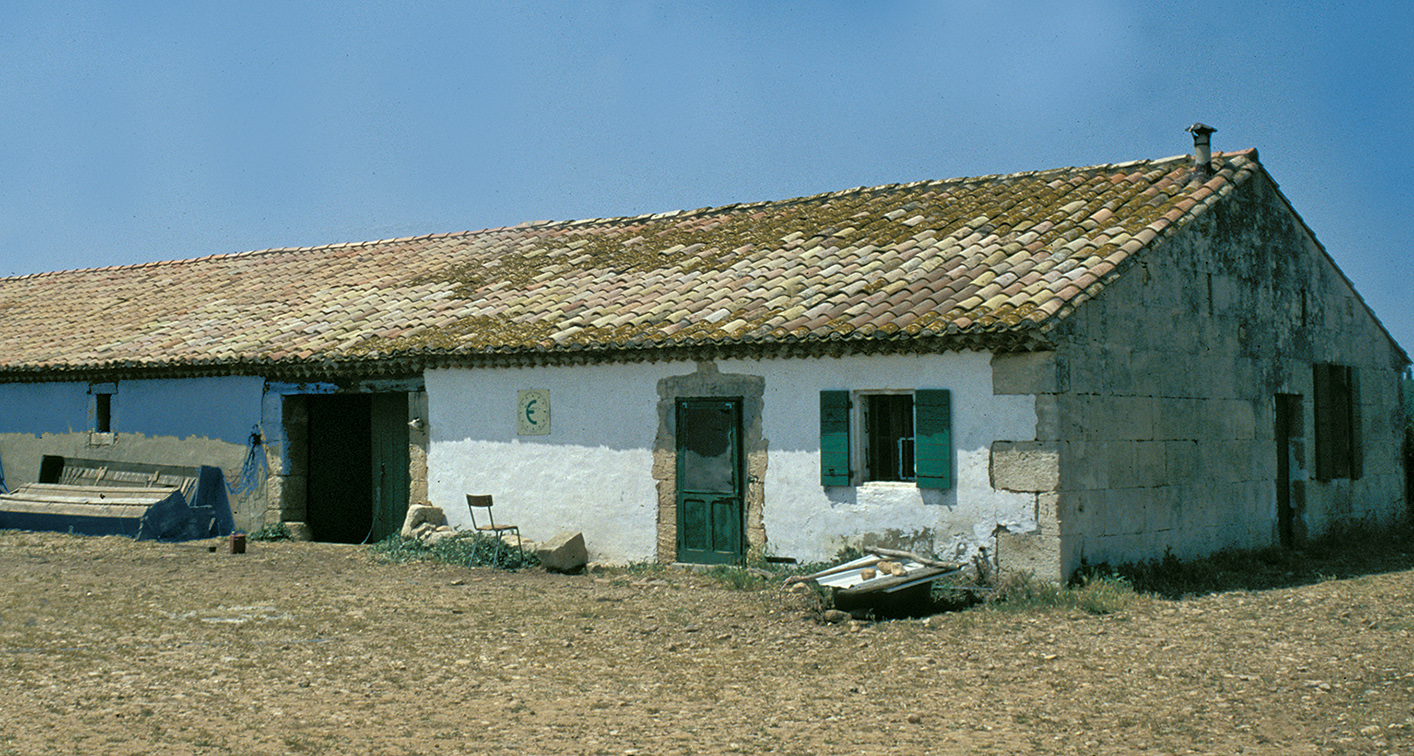 Schafstall Peau de Meau inmitten der Steinsteppe der Crau; südöstlich von St.-Martin-de-Crau